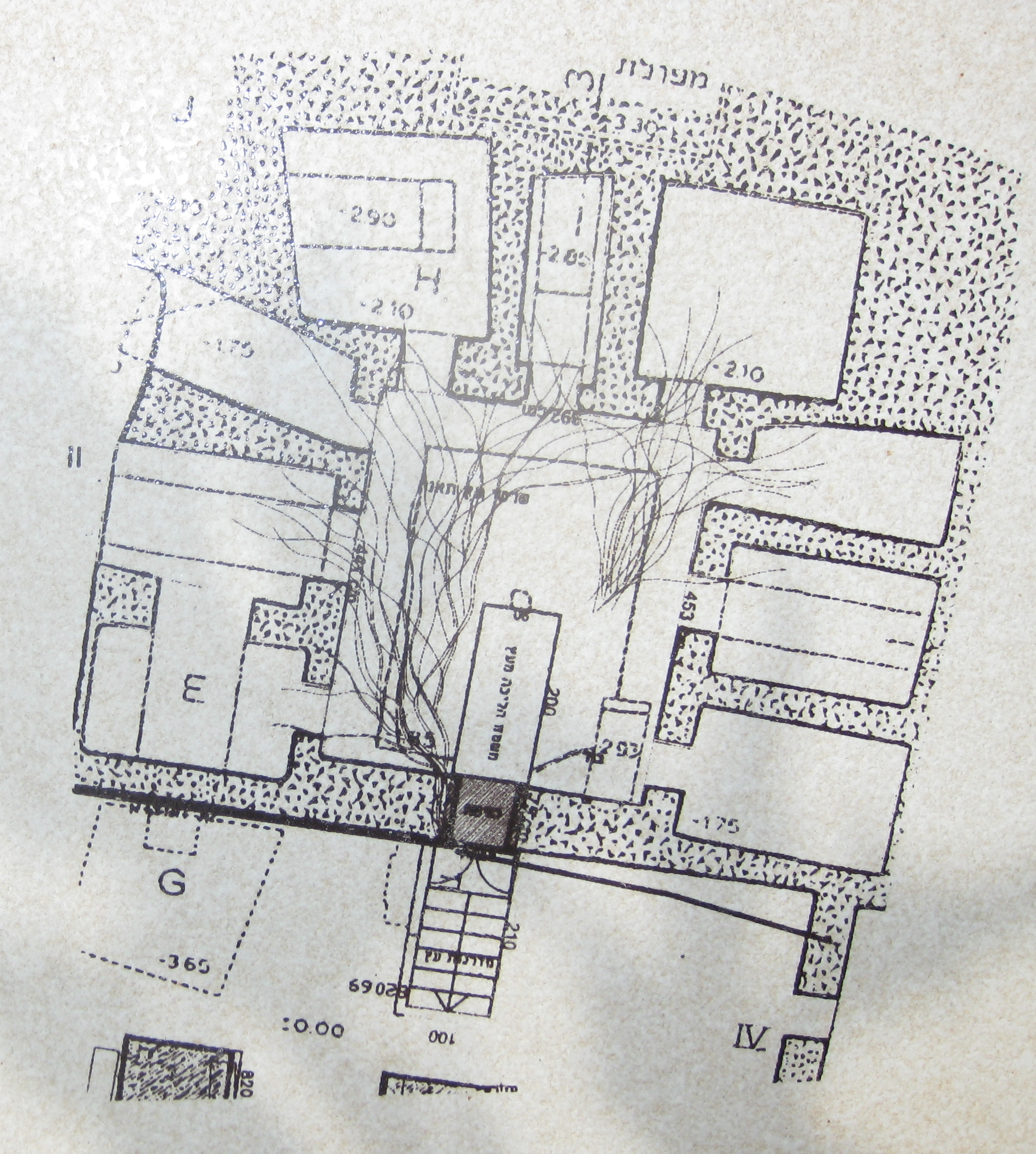 Mount Scopus הר הצופים